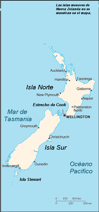 Mapa de Nueva Zelanda El mapa original fue obtenido de: Debido a que toda la información estaba en inglés, cambie algunos nombres a español. Solo deje las ciudades con sus nombres originales. --LadyInGrey 23:49 6 nov, 2004 (CET) Información de Copyright: map of New Zealand, converted directly from CIA World Factbook GIF